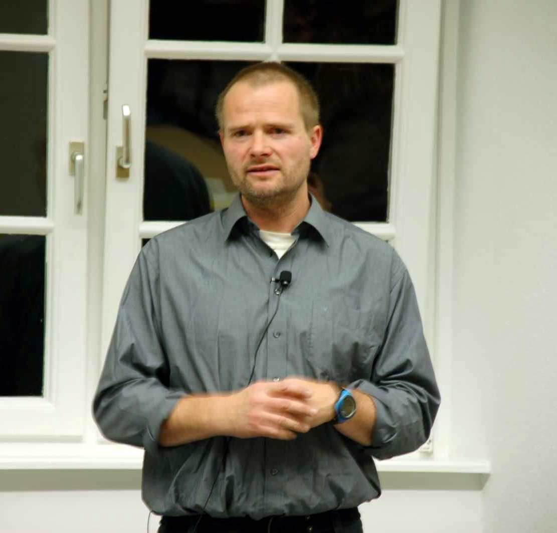 Das naturwissenschaftliche Argument für Tierrechte